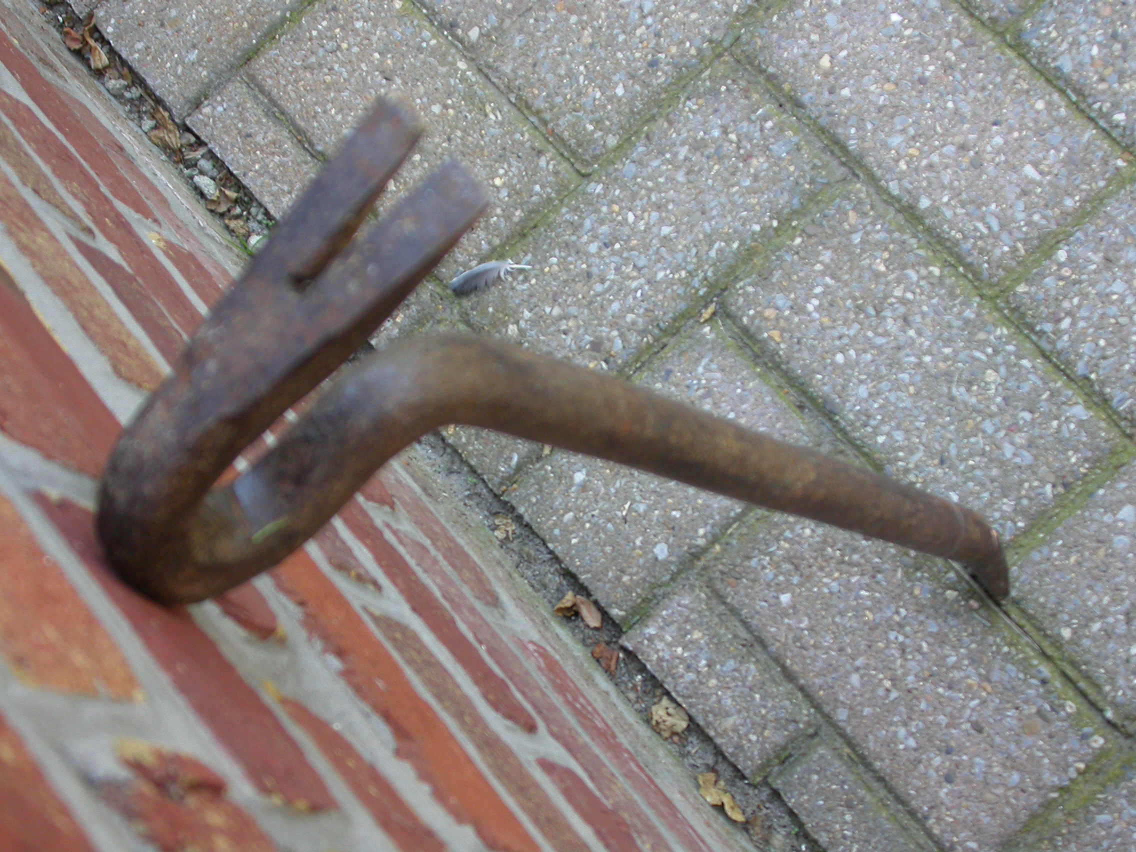 Detailzicht 'voet' van een koevoet.